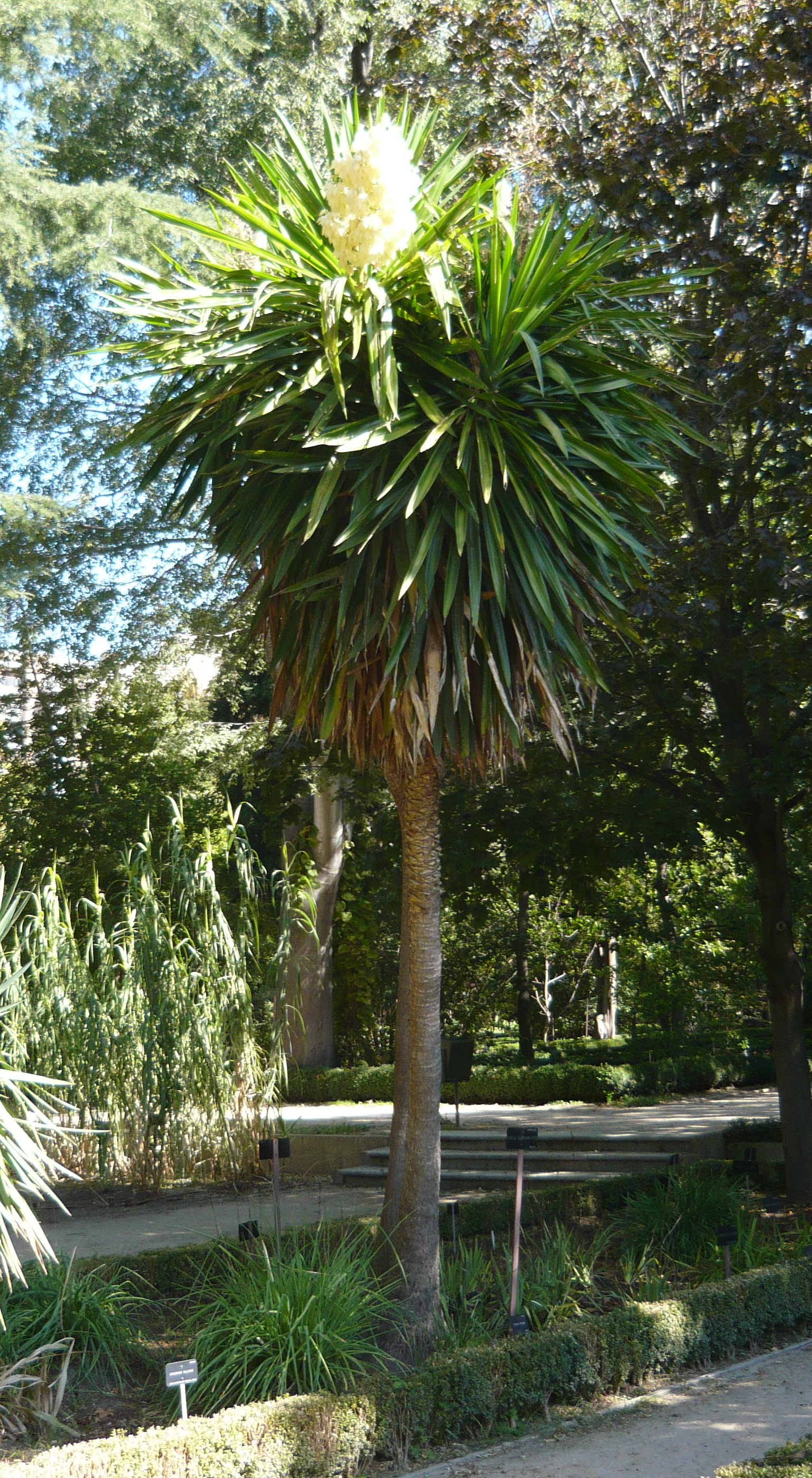 Yucca elephantipes. Real Jardín Botánico de Madrid